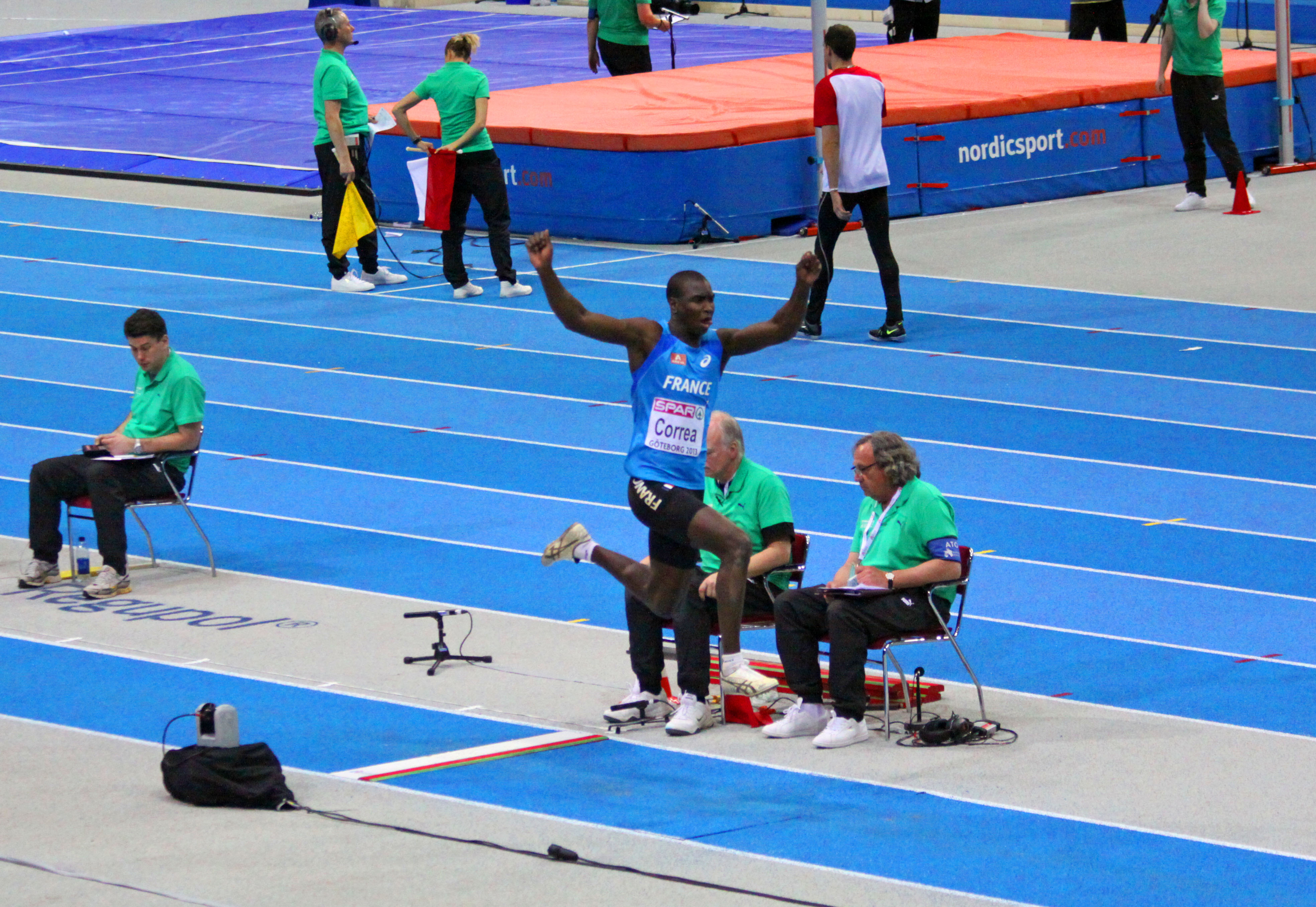 Göteborg. Harold Correa aux championnats d'Europe en salle 2013.